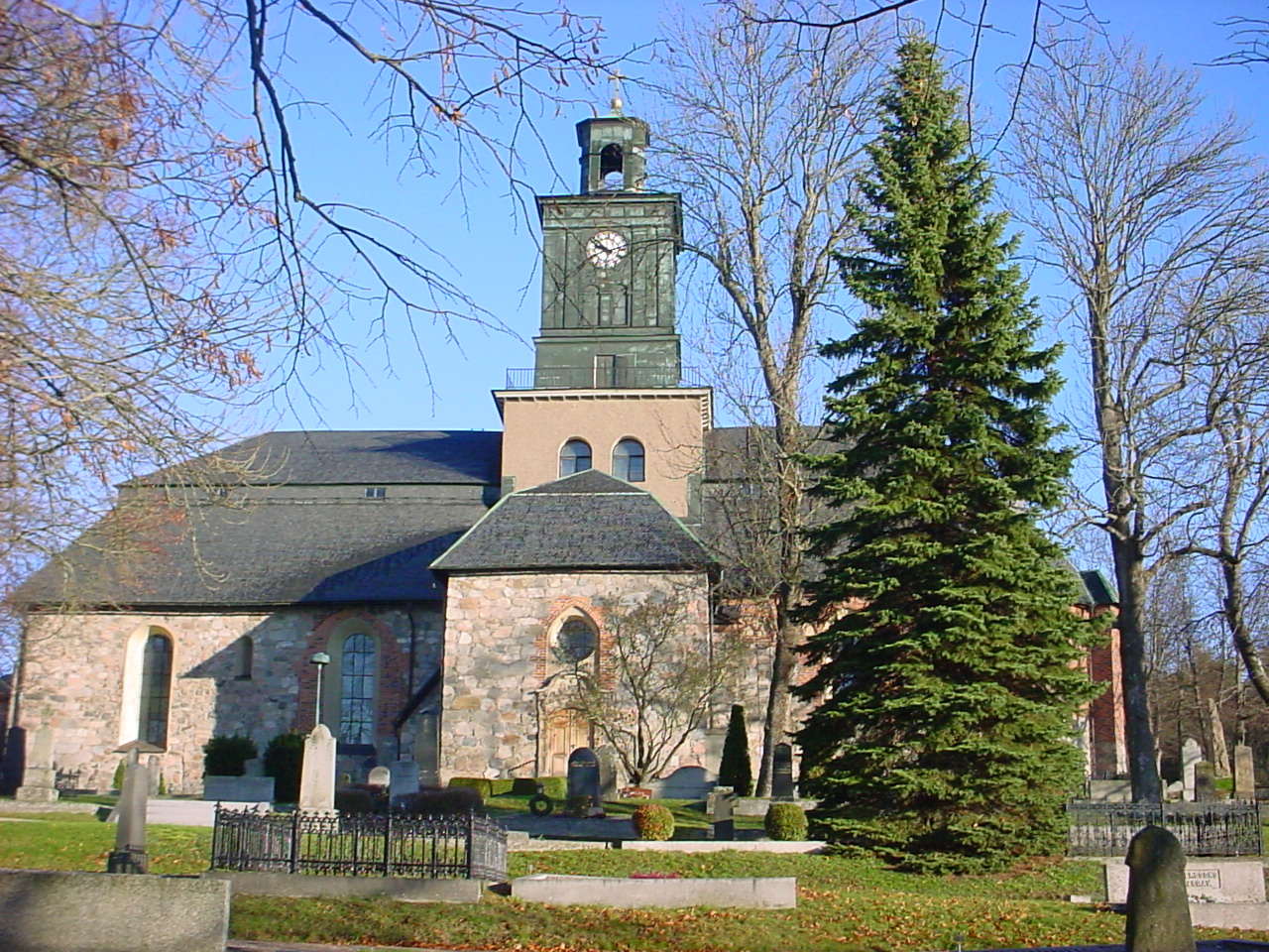 Enköping, Vårfrukyrkan.